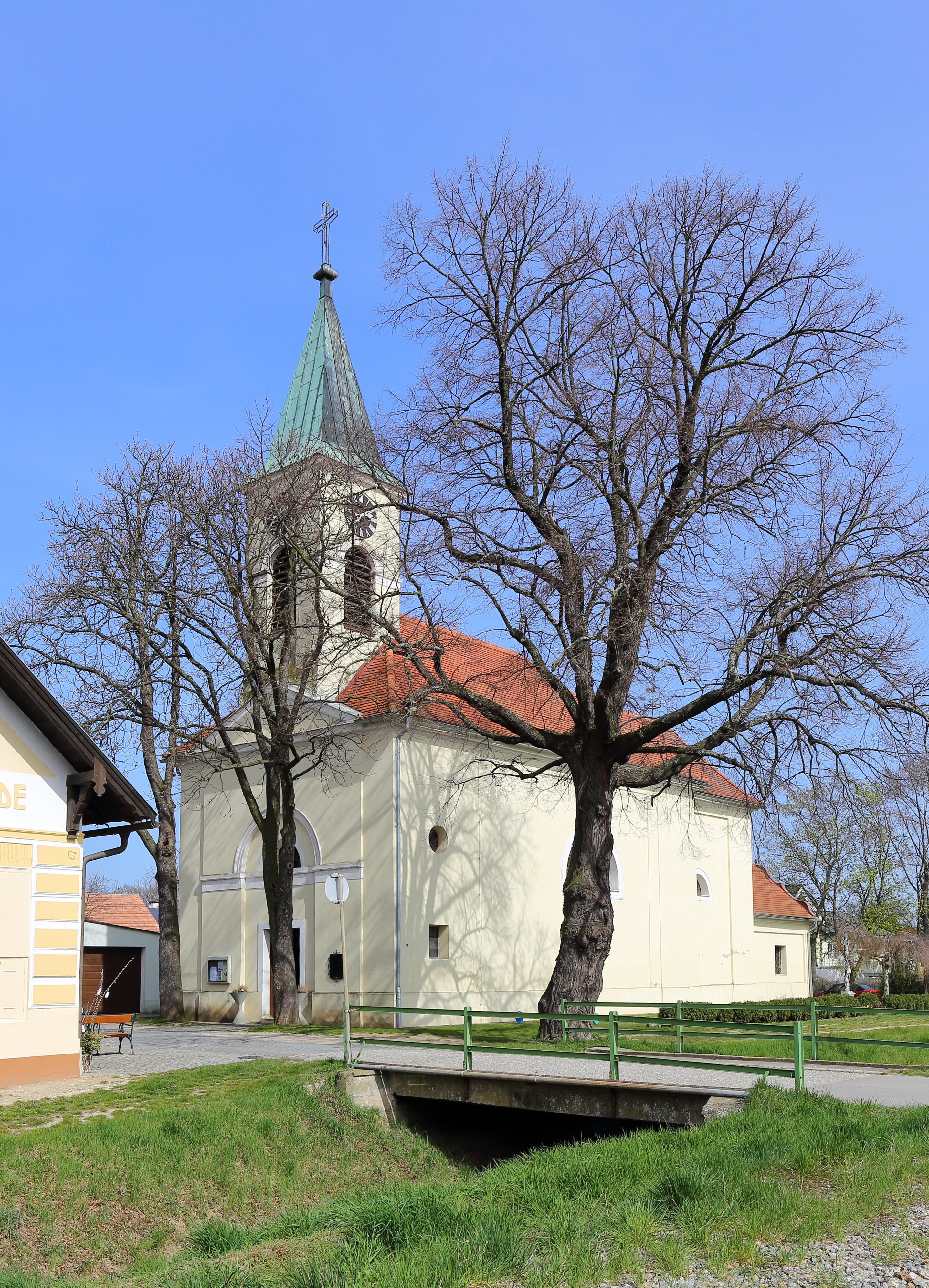 Südwestansicht der römisch-katholischen Filialkirche hl. Johannes Nepomuk in Ketzelsdorf, ein Ortsteil der niederösterreichischen Stadt Poysdorf. Der Chor und die Sakristei wurden im 4. Viertel des 18. Jahrhunderts errichtet und das Langhaus sowie die Turmfassade 1838.